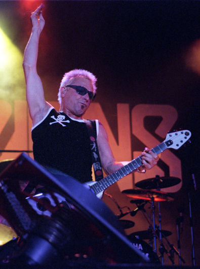 Rudolf Schenker, fotografiert am 24.05.2005 in Stuttgart bei einem Konzert von "Die Scorpions", Schlussplatz